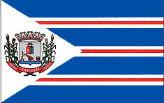 Bandeira de Jardim, Mato Grosso do Sul